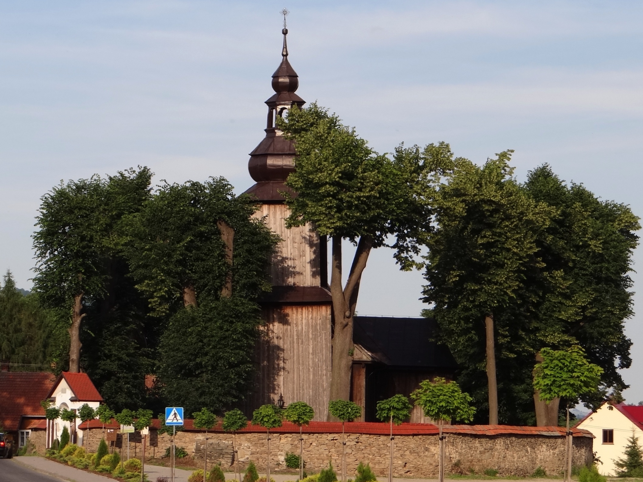 Męcina - kościół par. p.w. św. Antoniego Pustelnika, otoczenie, drzewostan